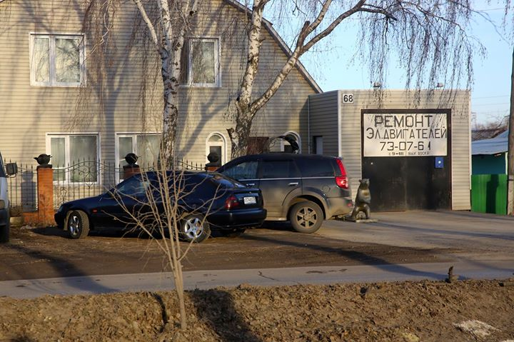 Работная изба, пристроенная к частному дому